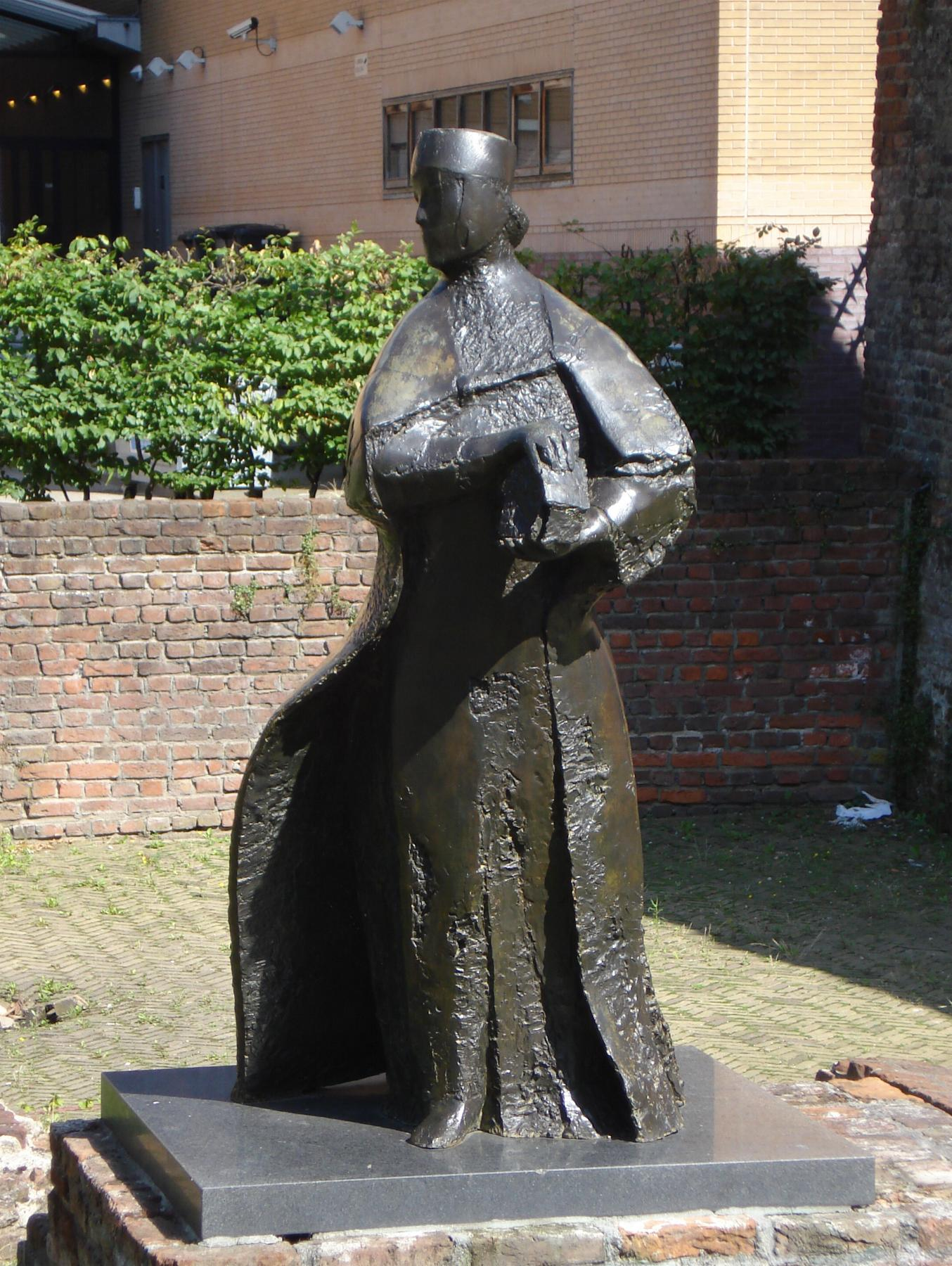 Schiedam, Broersvest. Kunstwerk "Vrouwe Aleida" van Theresia van der Pant. Schiedam/The Netherlands.